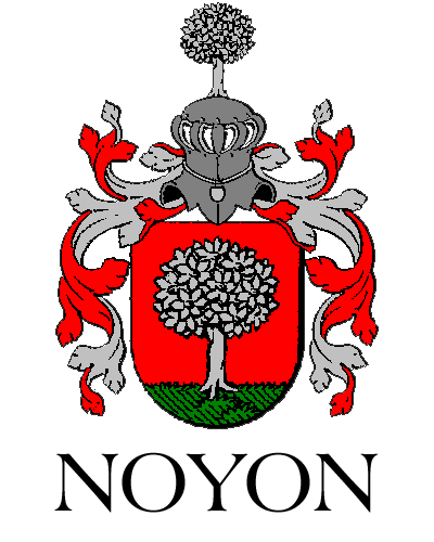 wapen van de familie Noyon